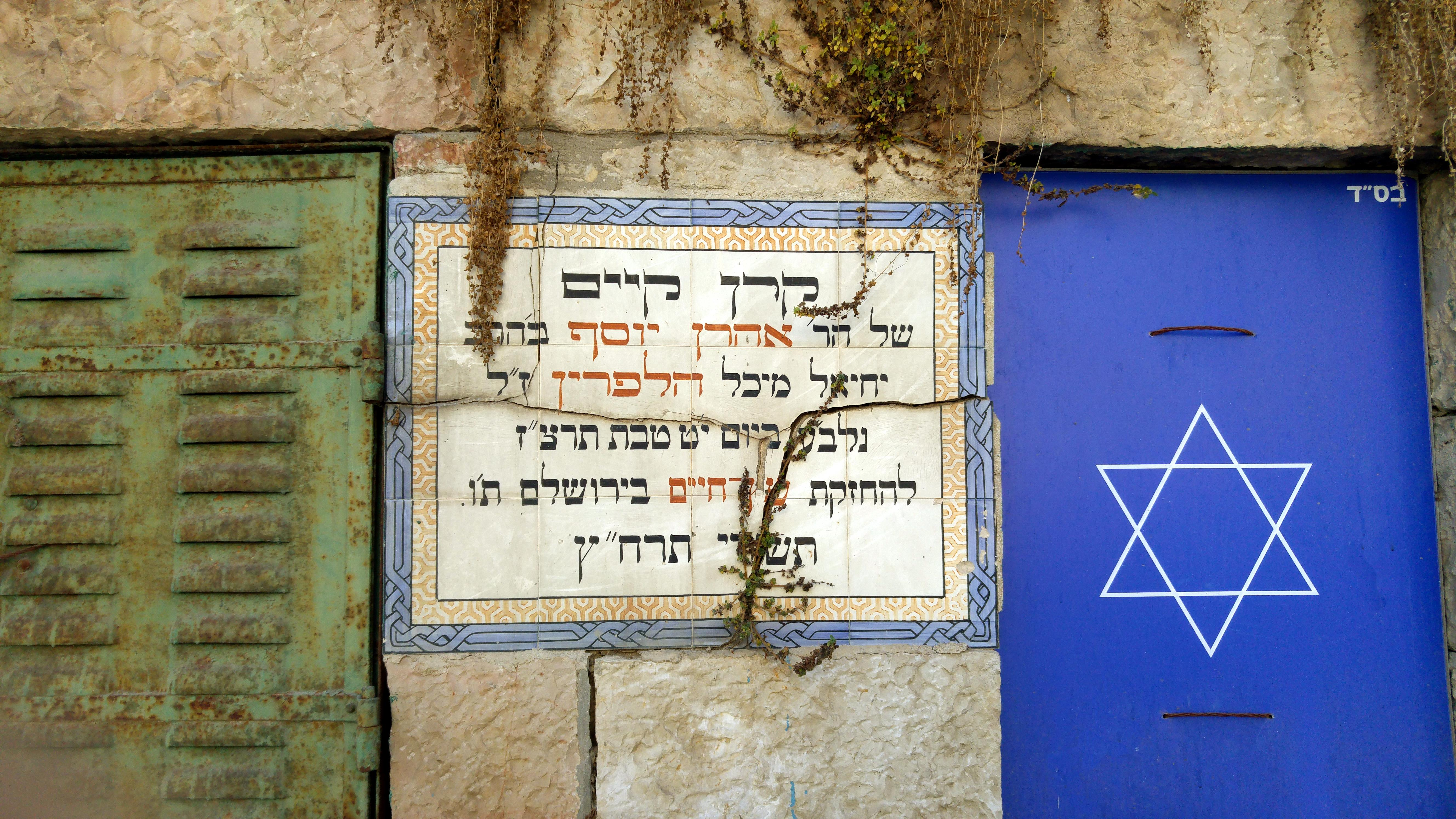 שכונת עץ חיים, ירושלים שלט הנצחה: קרן קיים של הר' אהרן יוסף ב' הרב יחיאל מיכל הלפרין ז"ל נלב"ע ביום יט טבת תרצ"ז להחזקת עץ חיים בירושלים ת"ו תשרי תרח"ץ